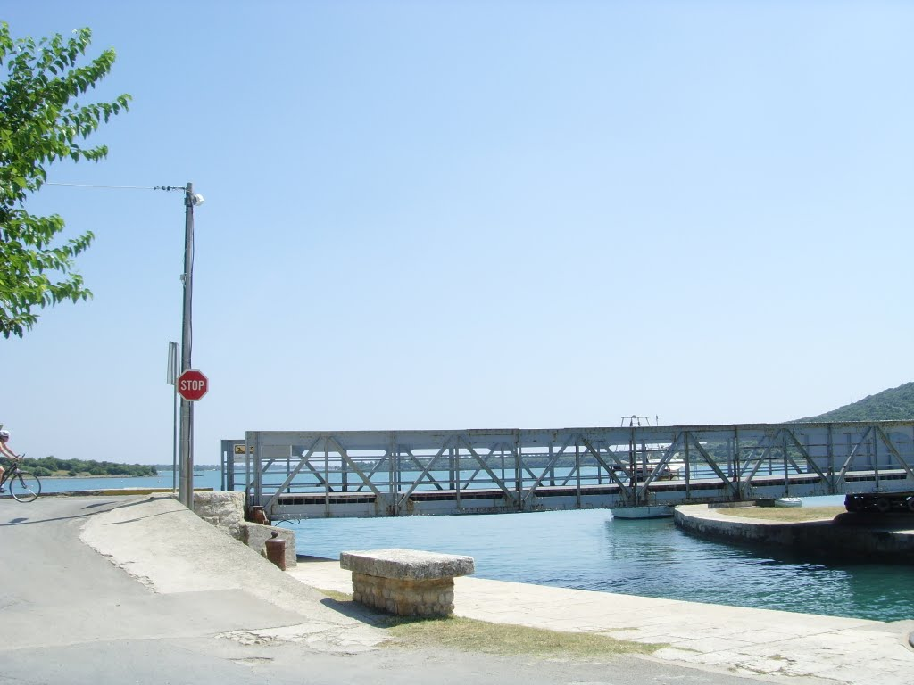 Osor Bridge